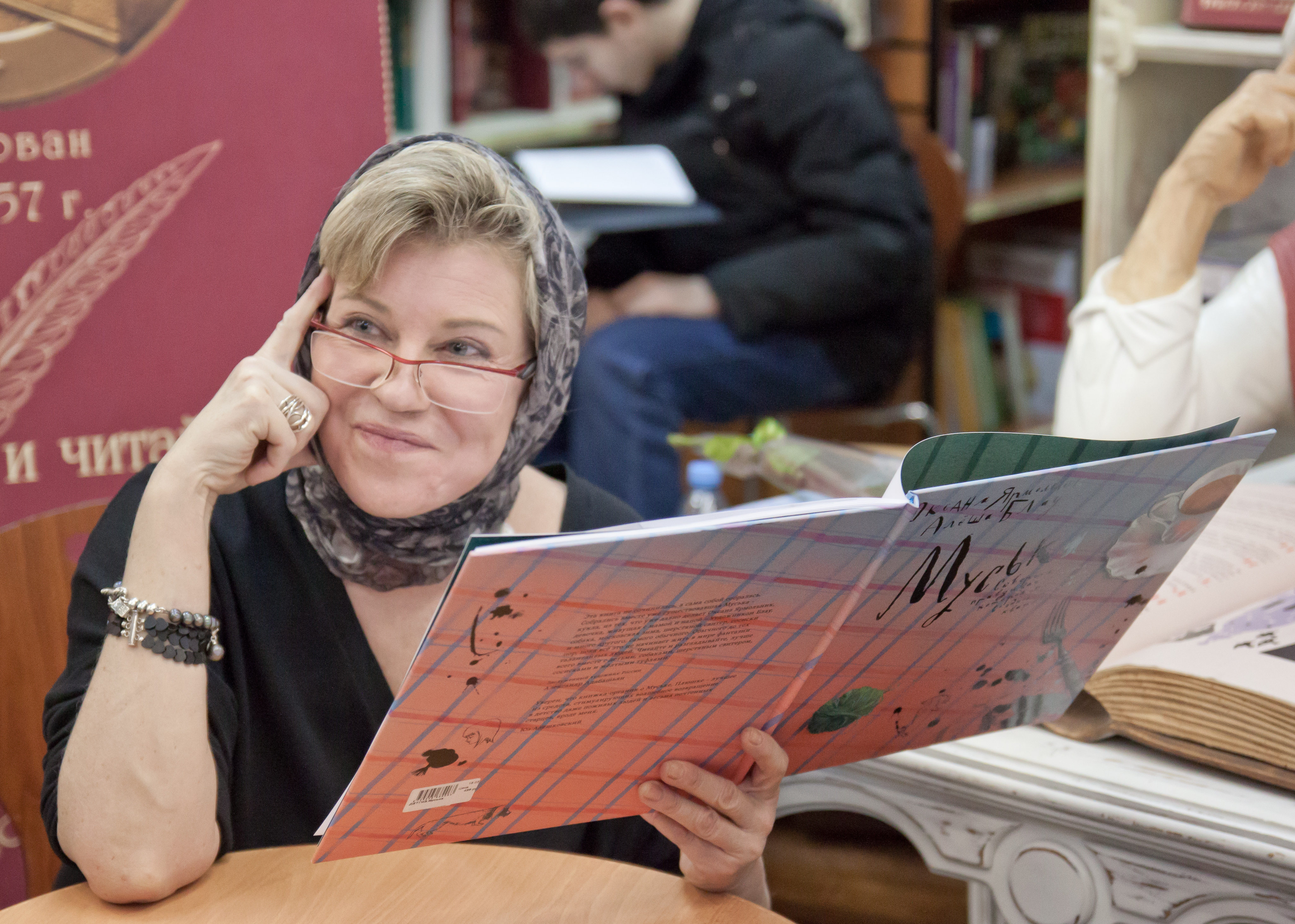 Оксана Ярмольник на презентации книги "Муська"